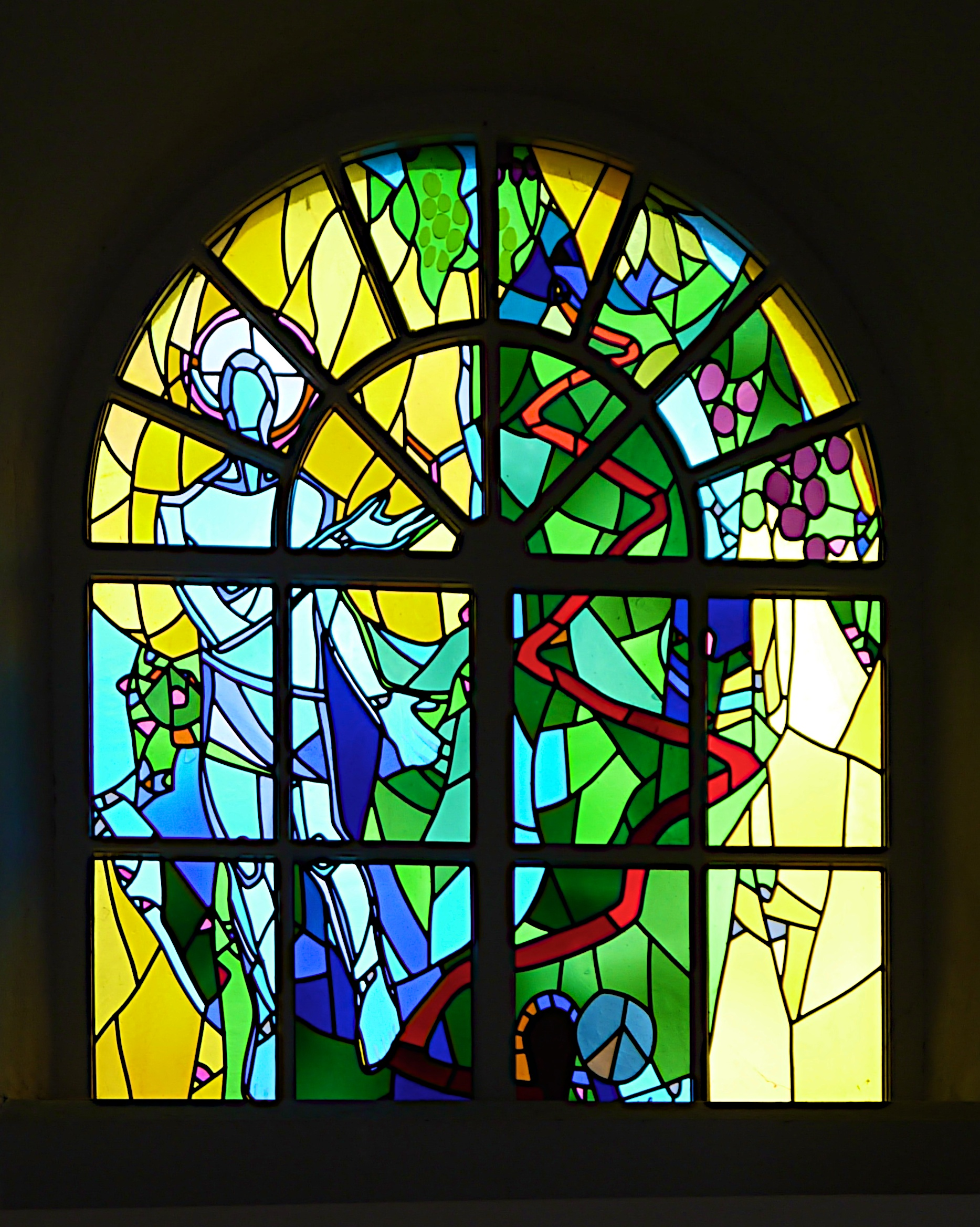 Glasfenster "Der Auferstandene" von Adi Holzer in der St.-Mariae-Jakobi-Kirche in Salzgitter-Bad. Ausführung: Atelier Per Hebsgaard, Kopenhagen im Jahr 2000.